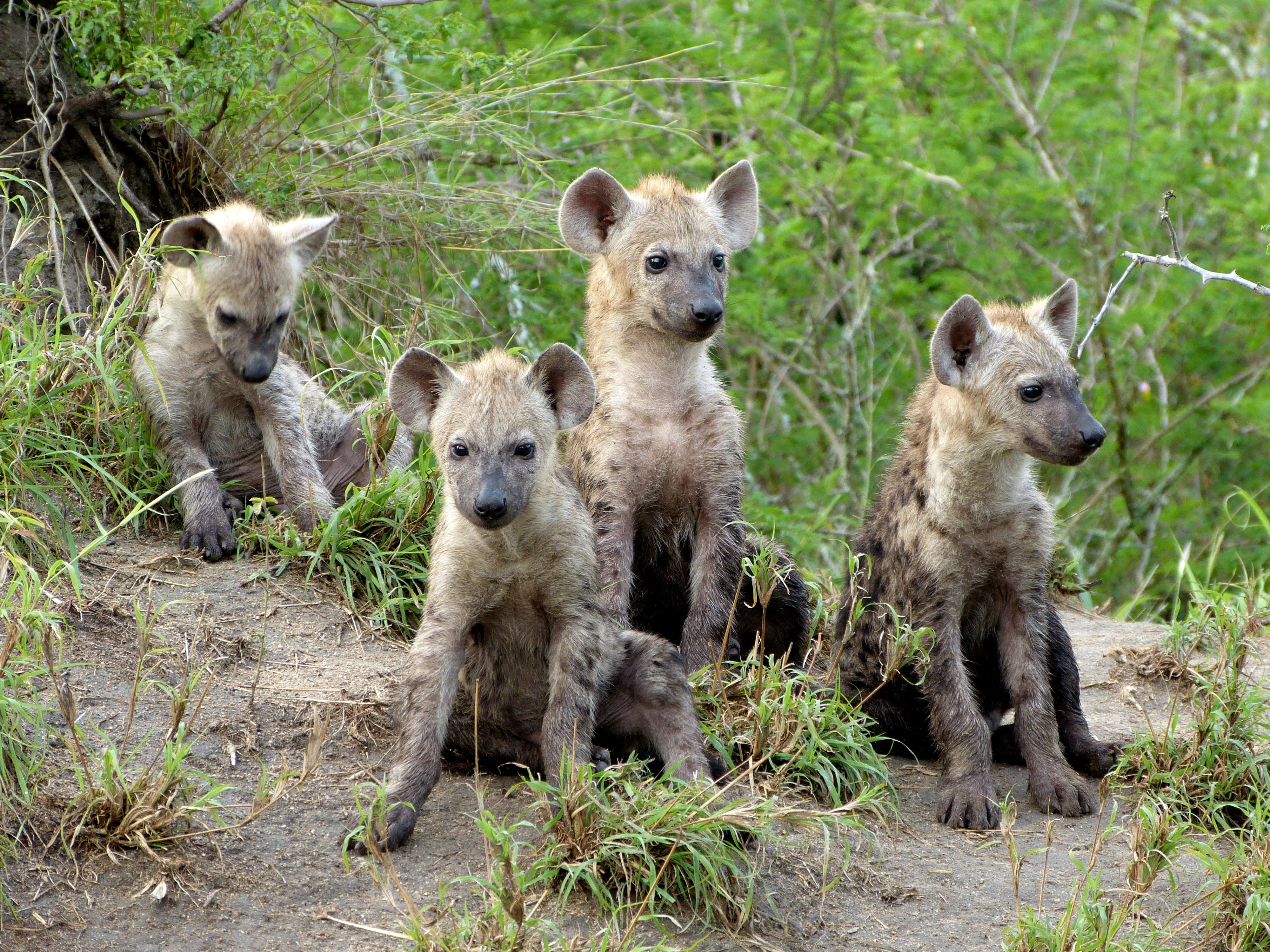 Spotted hyena cubs in Limpopo Rural, Limpopo ZA